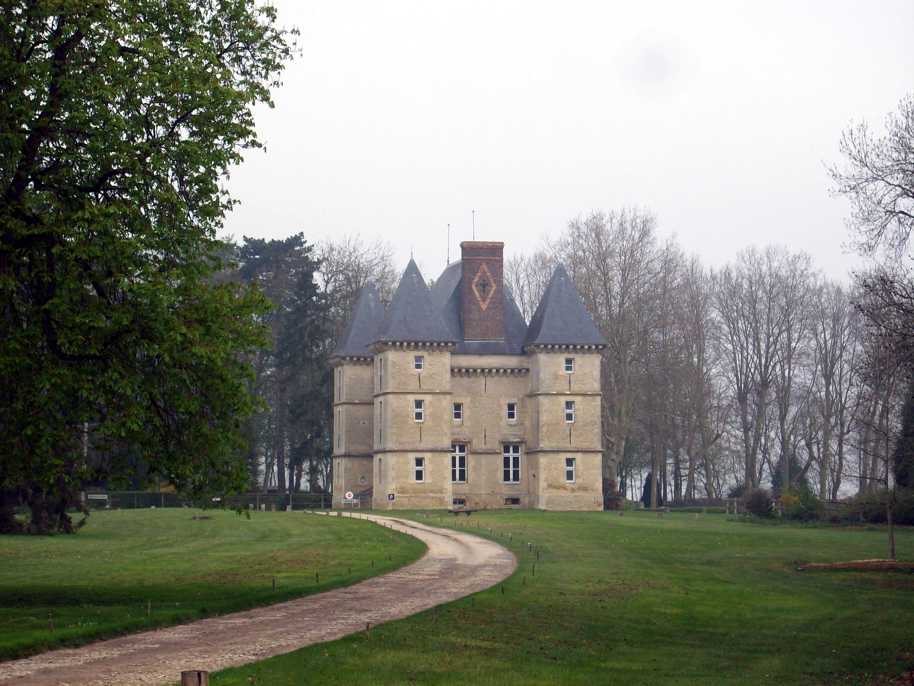 Château de Fours-en-Vexin et le parc.